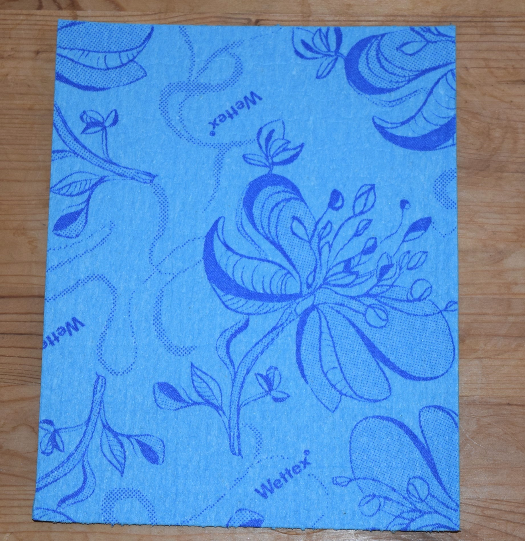 Dry, blue sponge cloth.